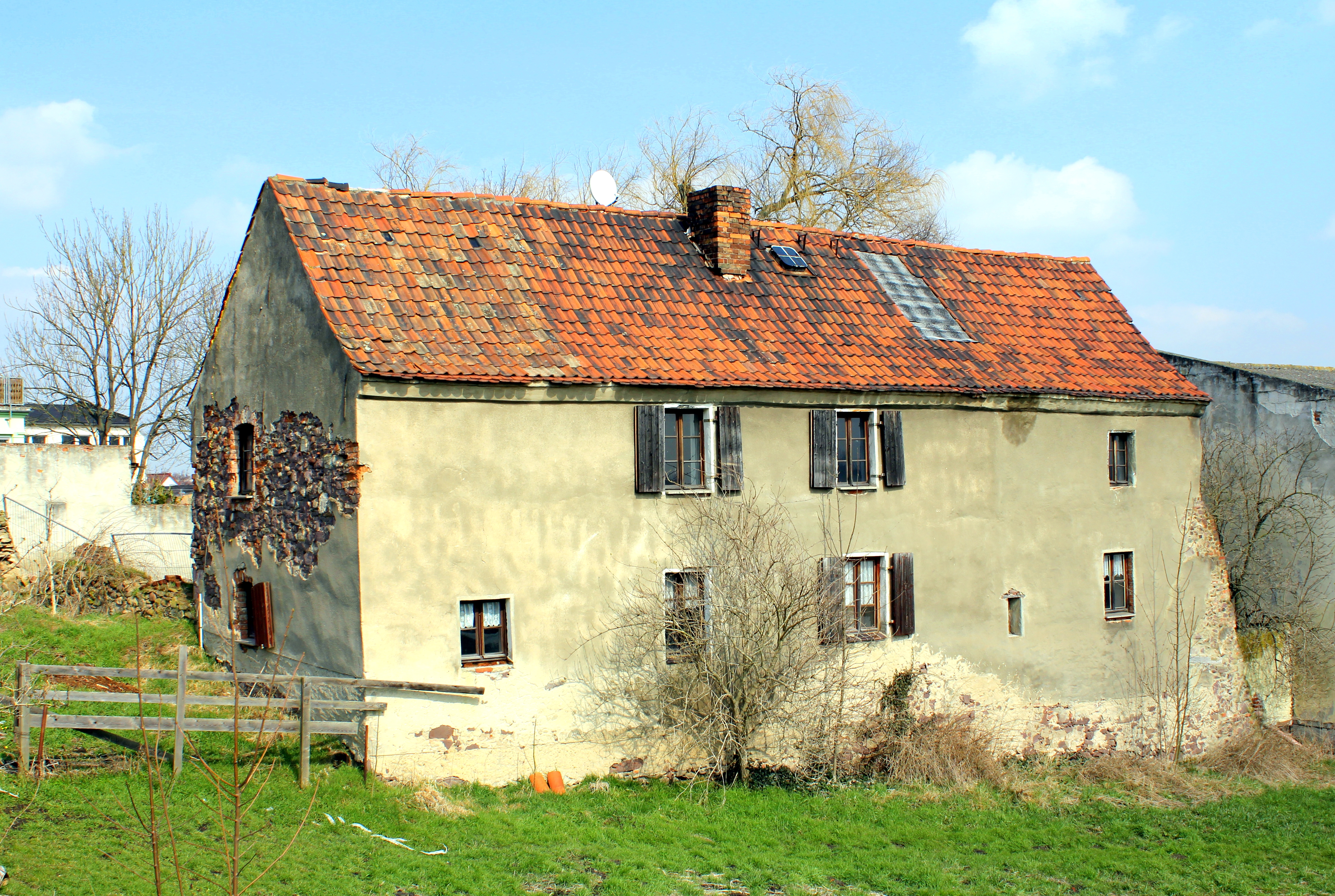 Zollhaus, Magdeburger Straße 5, Elbeu